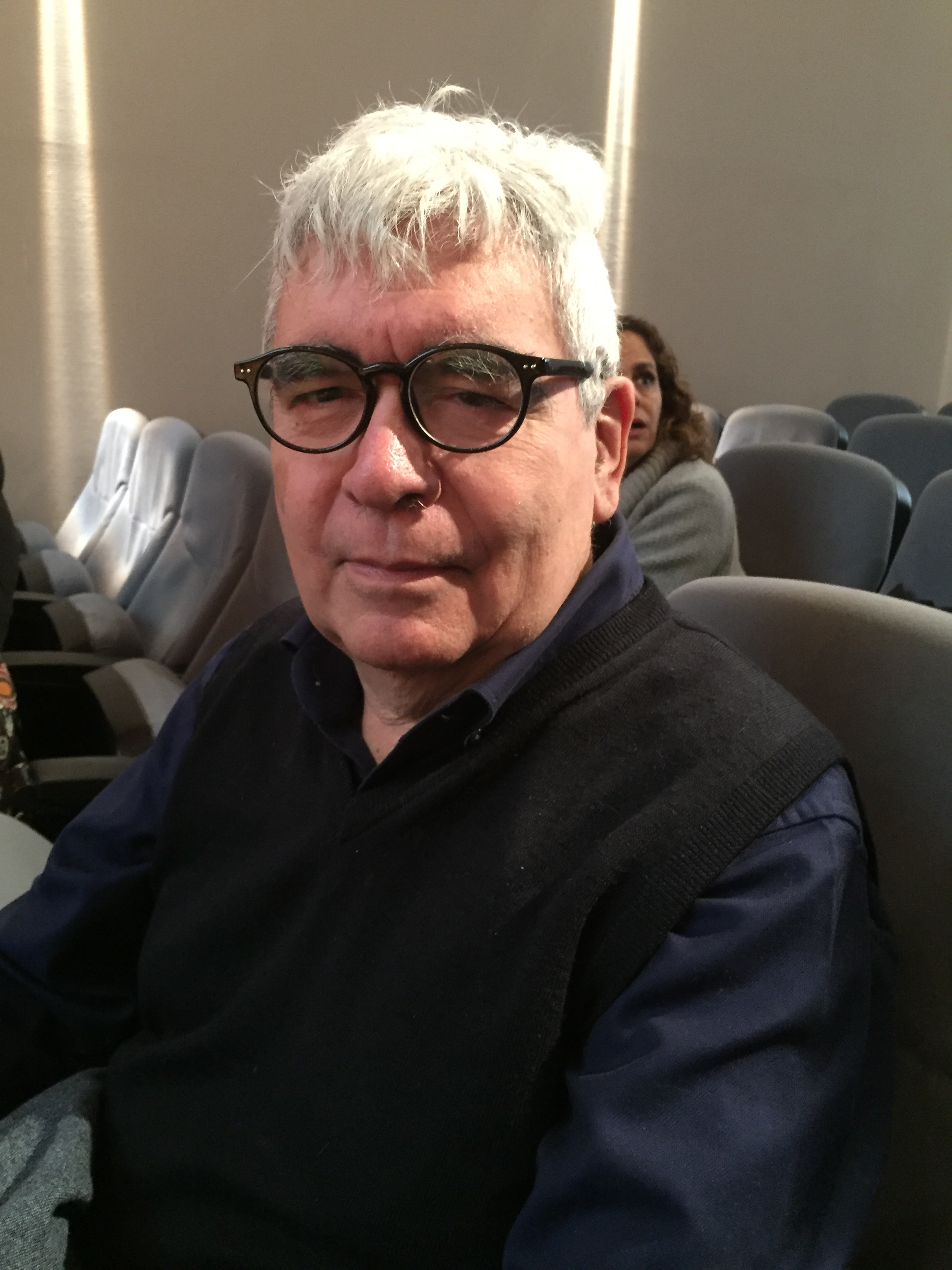 En el Museo Lázaro Galdiano de Madrid